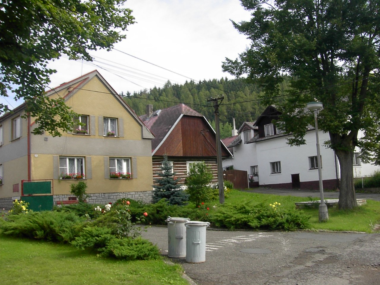 Náves v Těškově.